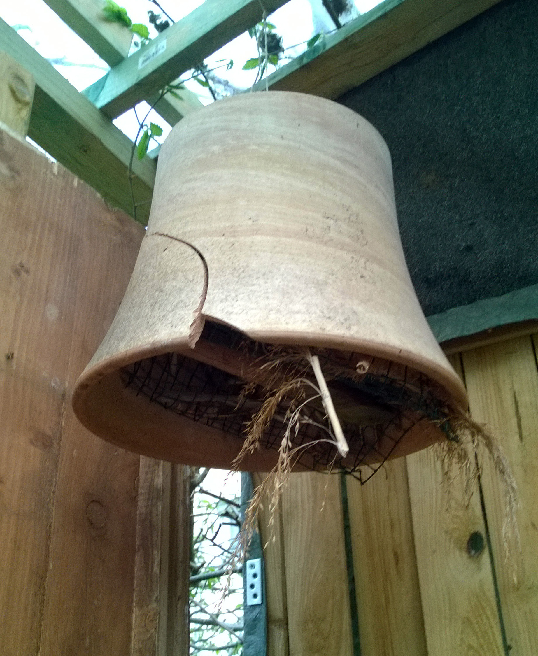 Ohrwurmnistplatz, ein umgedrehte Blumentopf befühlt mit Stroh und gesichert mit ein Drahtgeflecht.